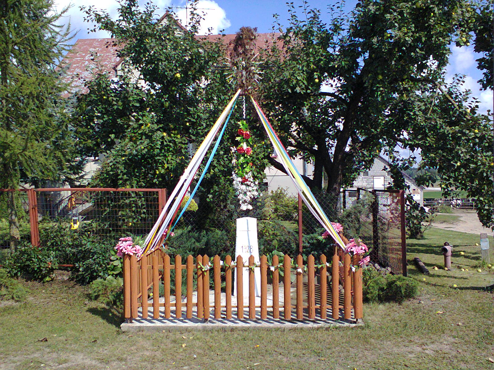 Budy Poryckie - zabytkowy krzyż (powiat kolneński)